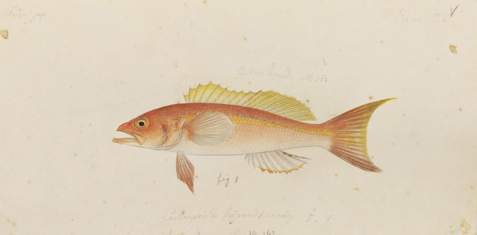 Chelidoperca hirundinacea (Valenciennes)